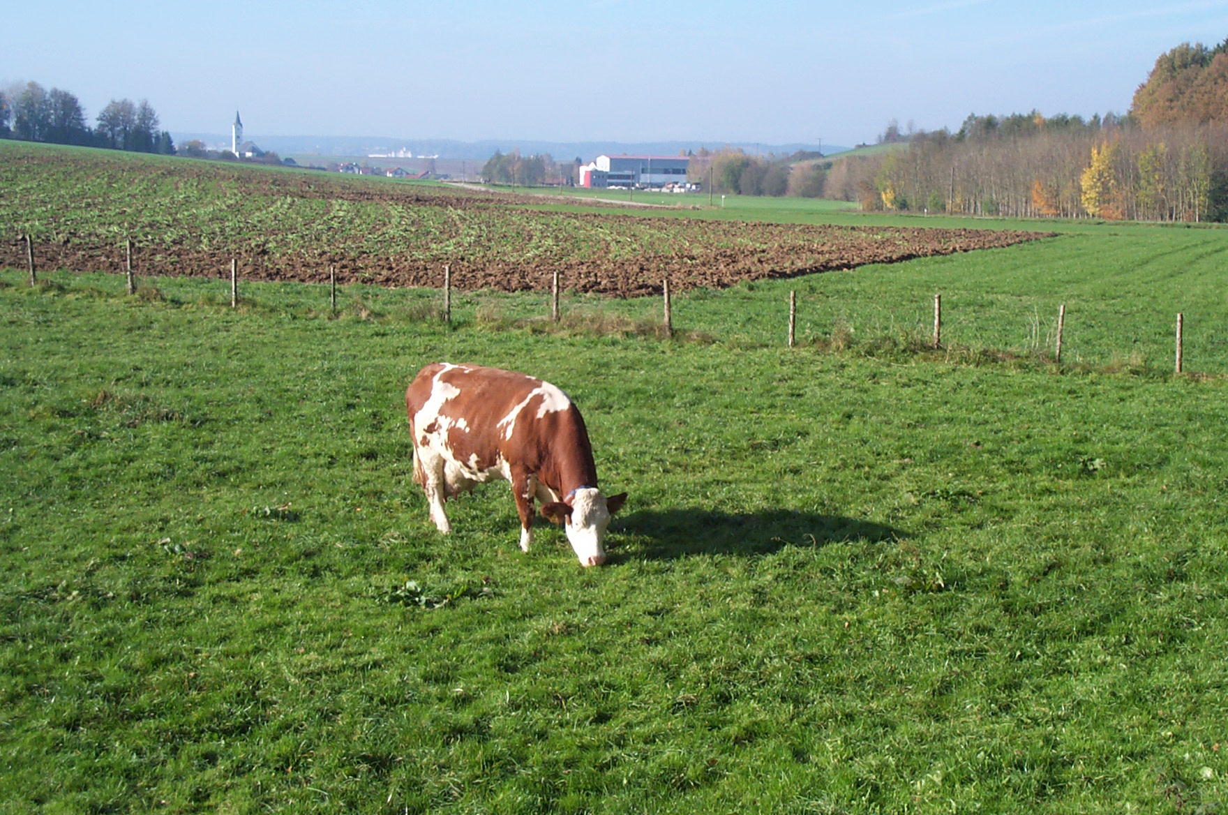 Laberweinting, Hofkirchen. Kuhweide am Poschenhof. Im Hintergrund Hofkirchen.